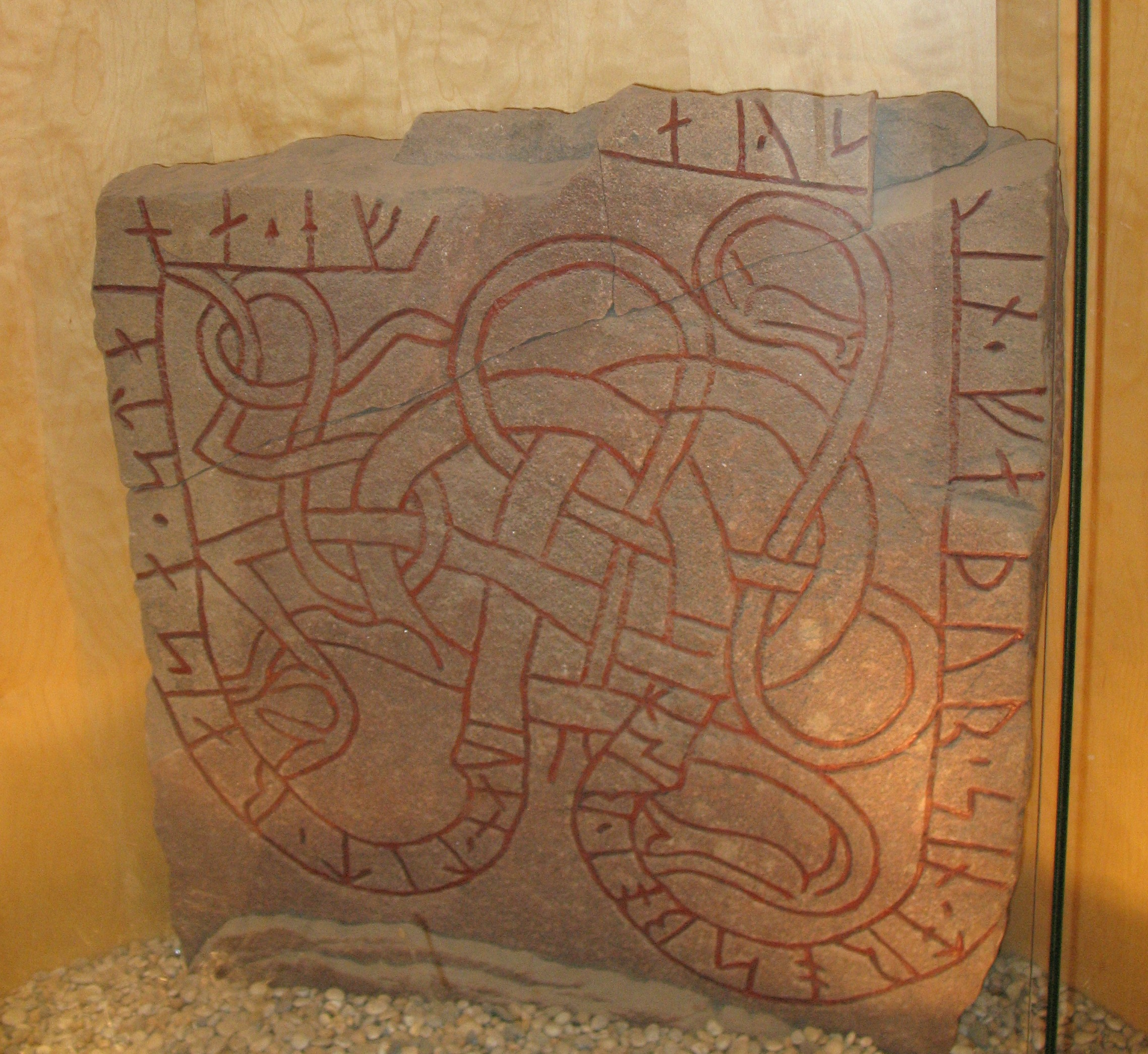 runestone